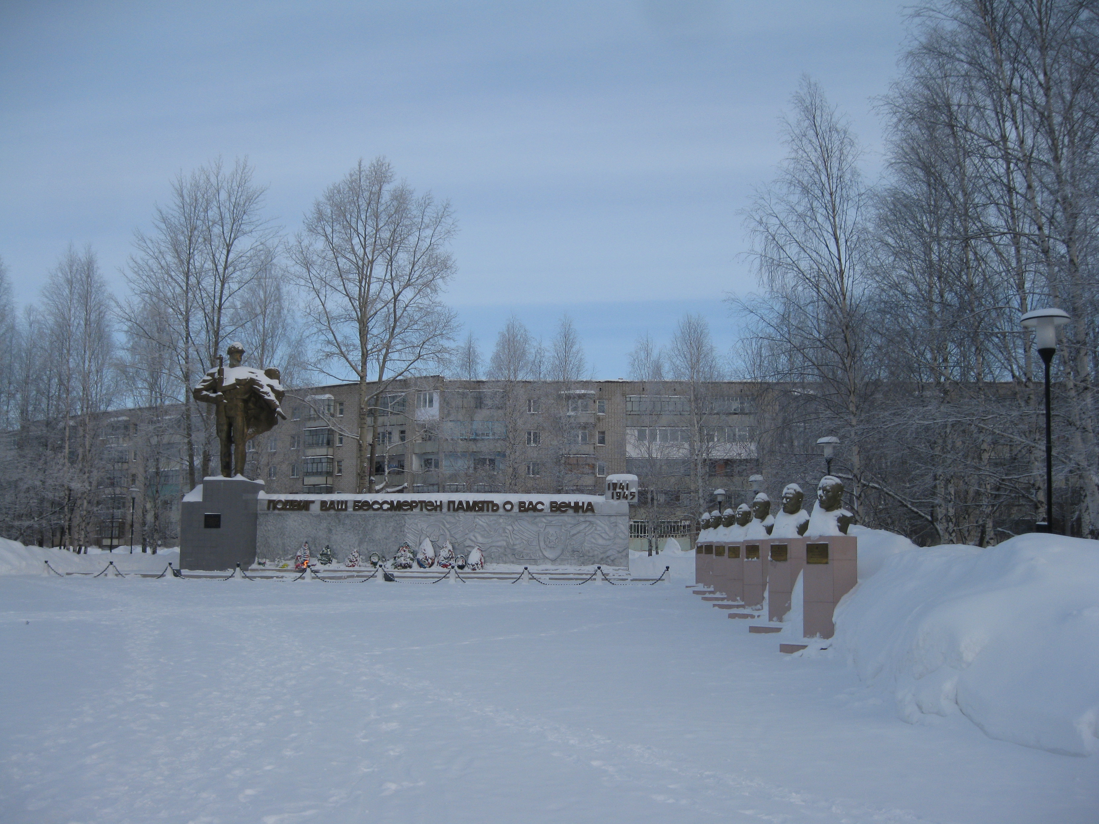 Площадь Победы в городе Чернушка, зима.